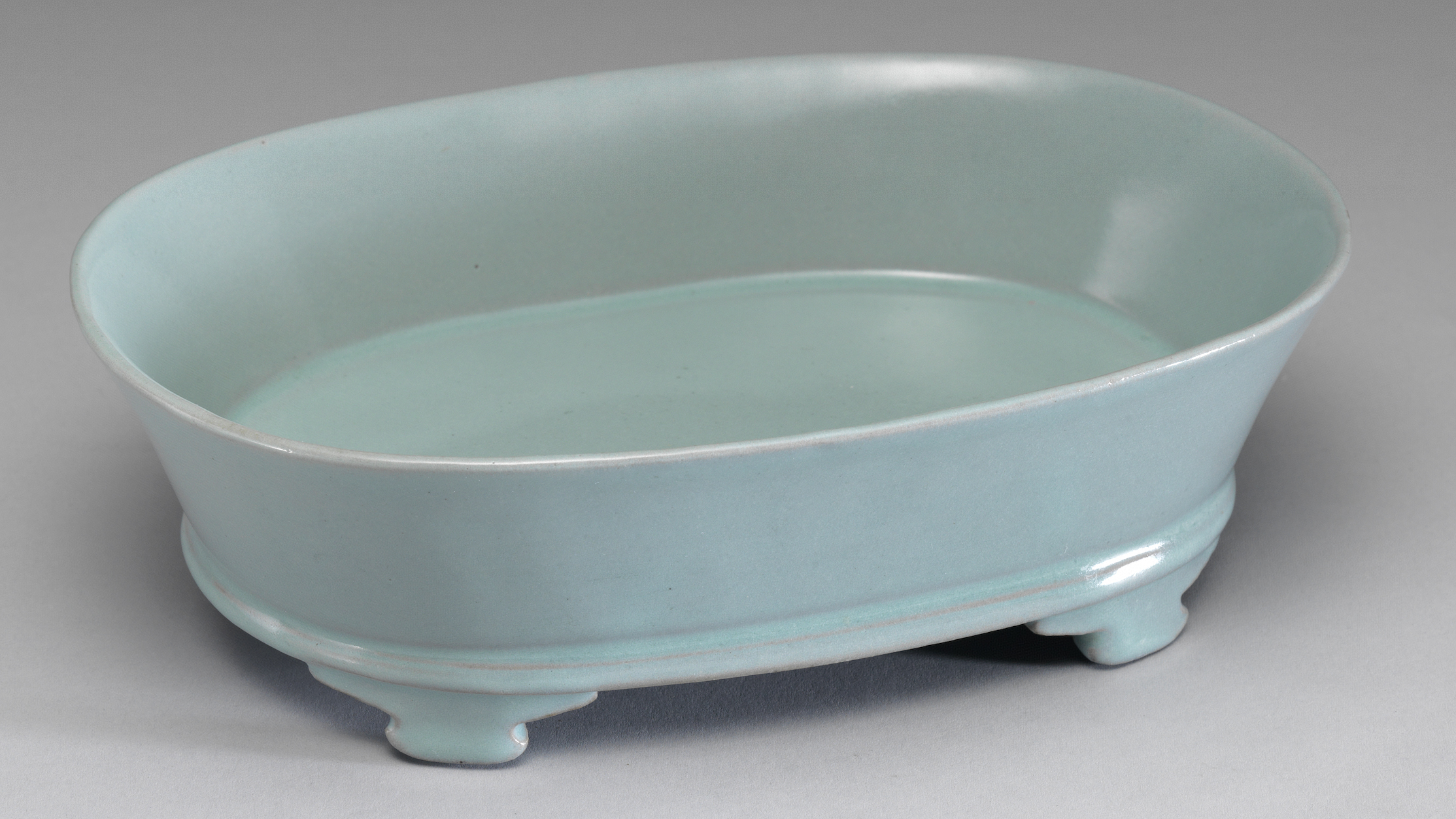 中文（中国大陆）: 北宋汝窯青瓷無紋水仙盆